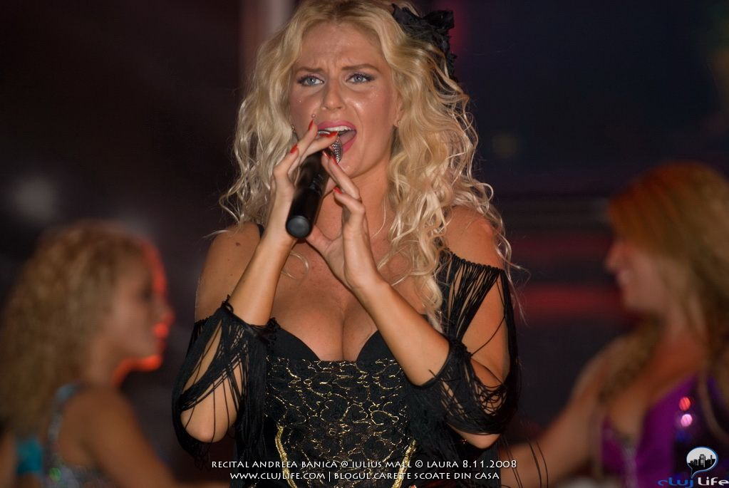 La cantante rumana Andreea Banica en un concierto en Cluj, 2008.